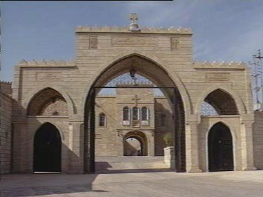 Gereja_Katolik_Suriah